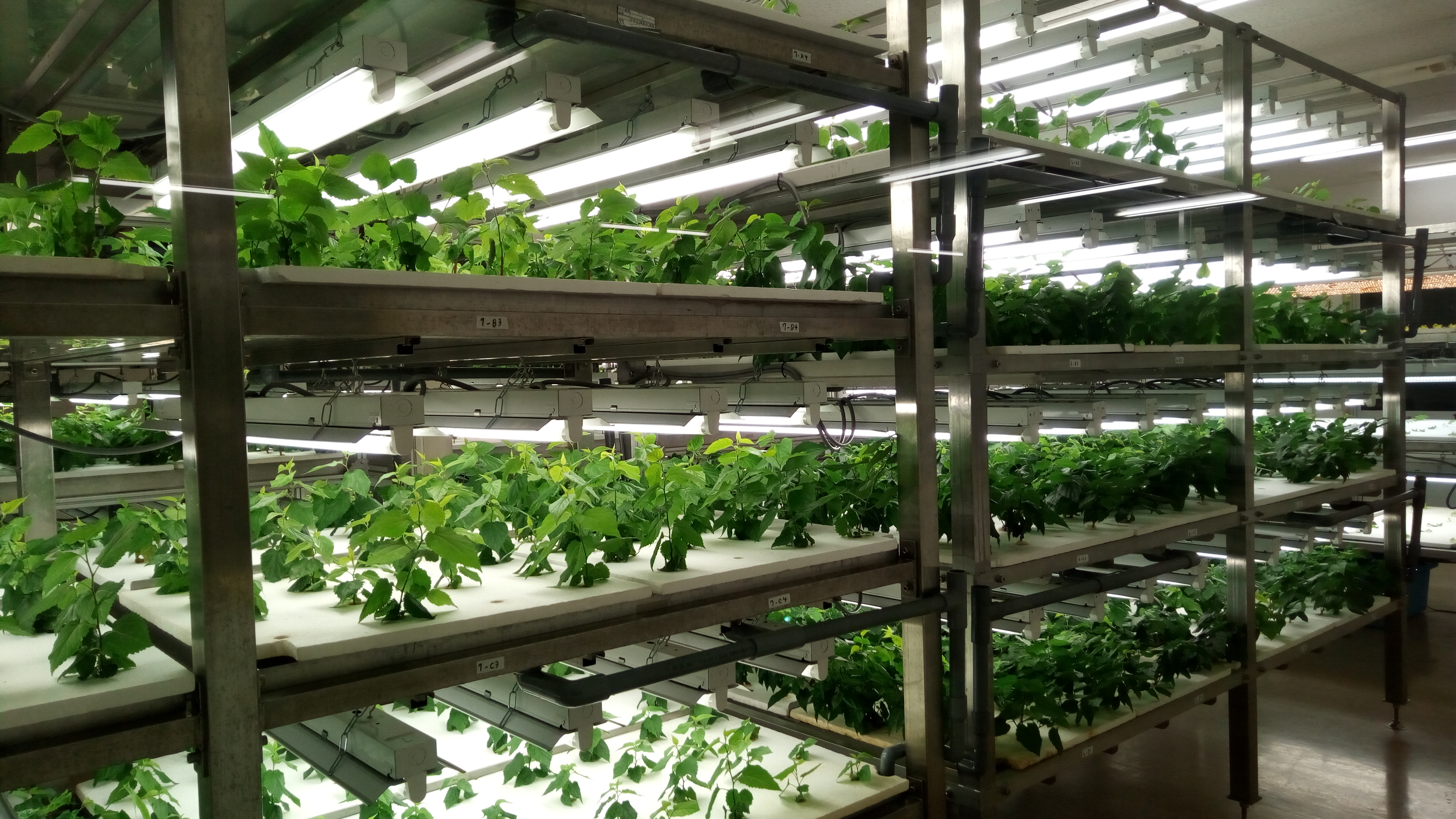 桑の水耕栽培をされているストリームさんにて